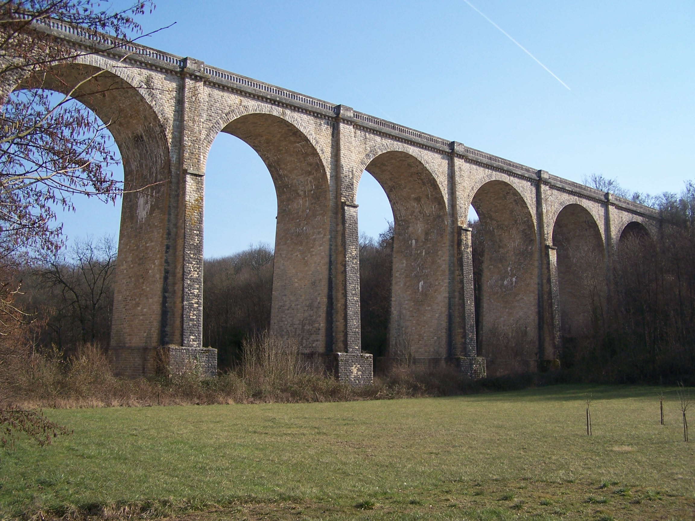 Le viaduc de Villedômer, qui permet à la ligne Brétigny-Tours de traverser la vallée du Madelon.